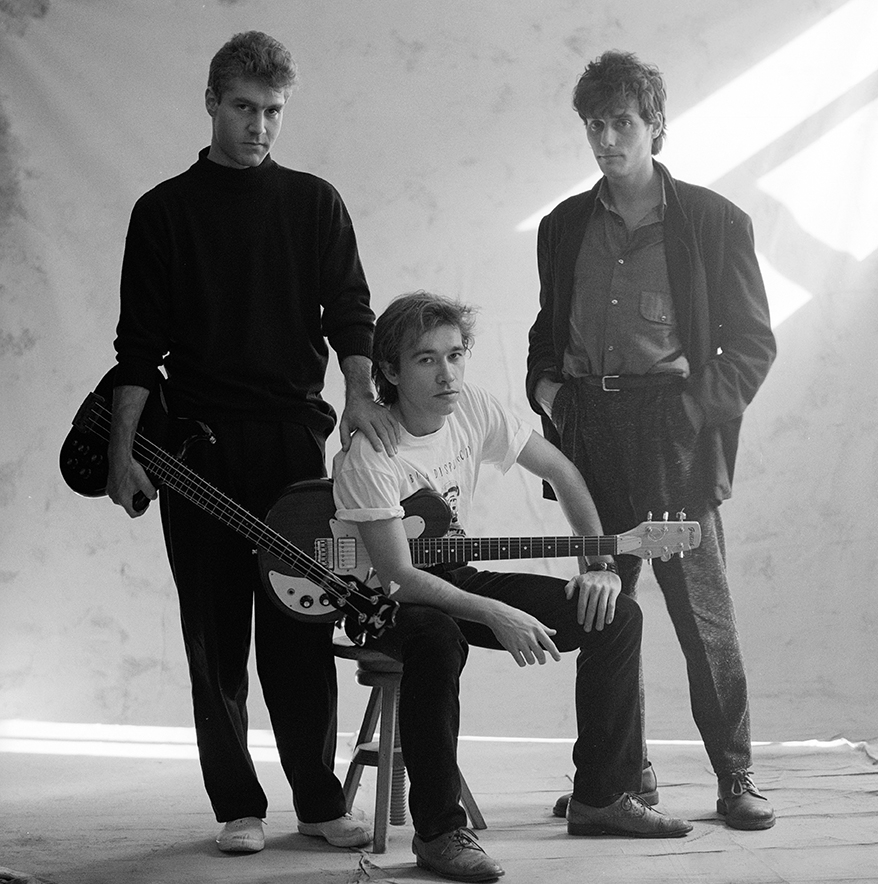 Nacho Gª Vega, Antonio Vega, Carlos Brooking